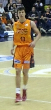 Lucic.